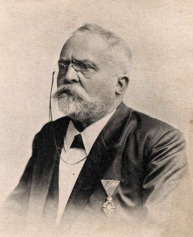 Václav Naxera (1835 - 1908), Rakouský a český politik.